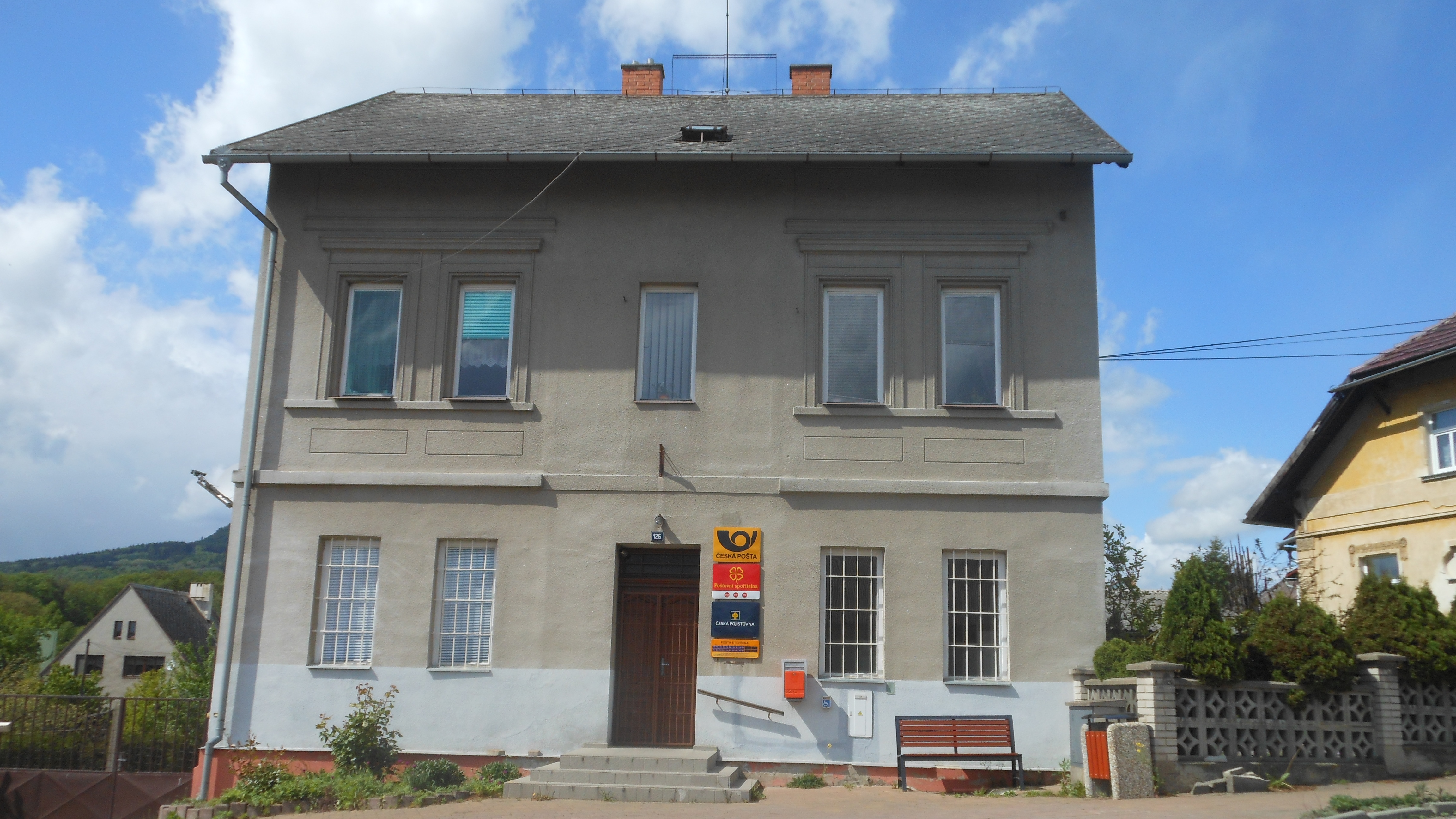 poštovní úřad v Liběšicích